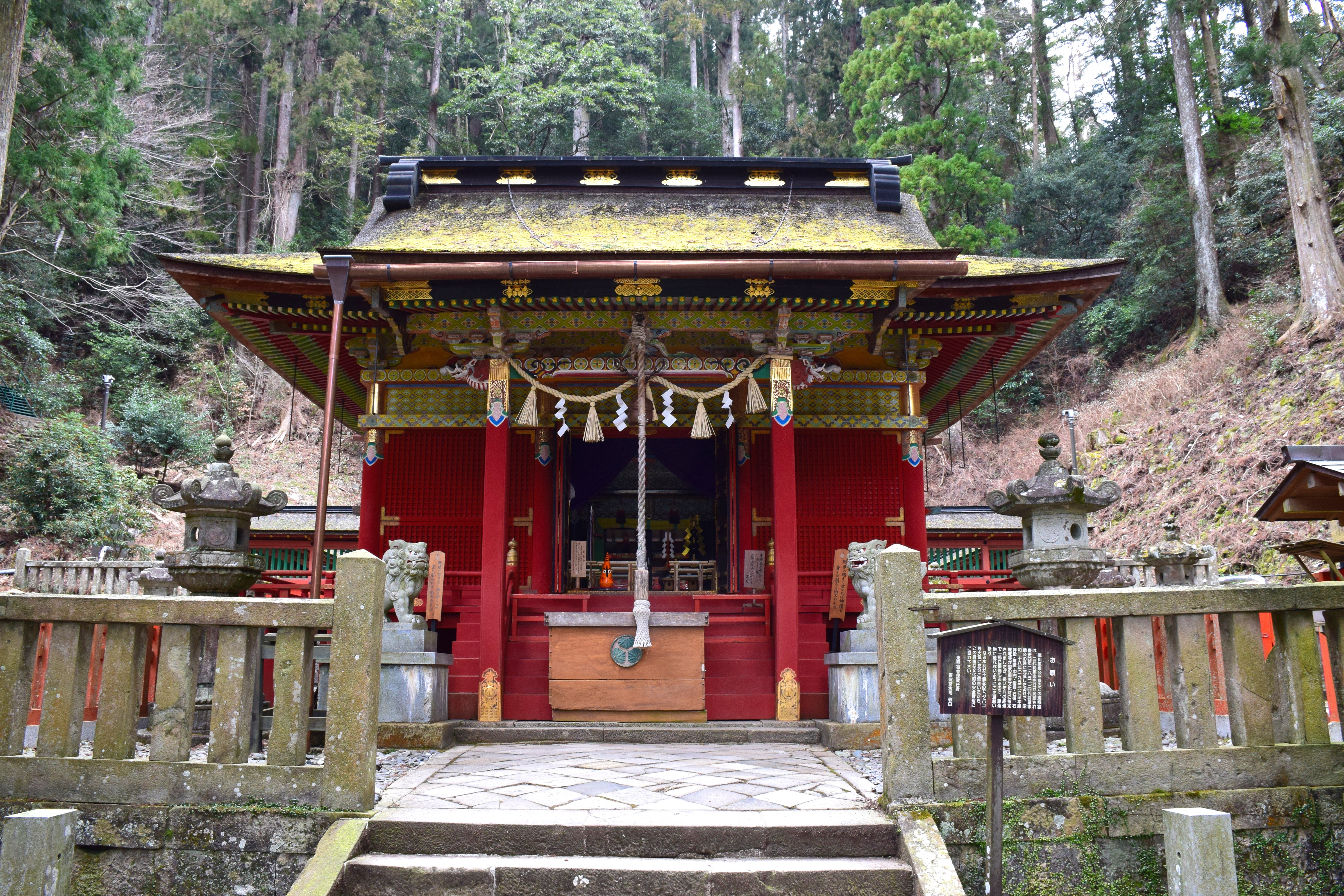 鳳来山東照宮拝殿